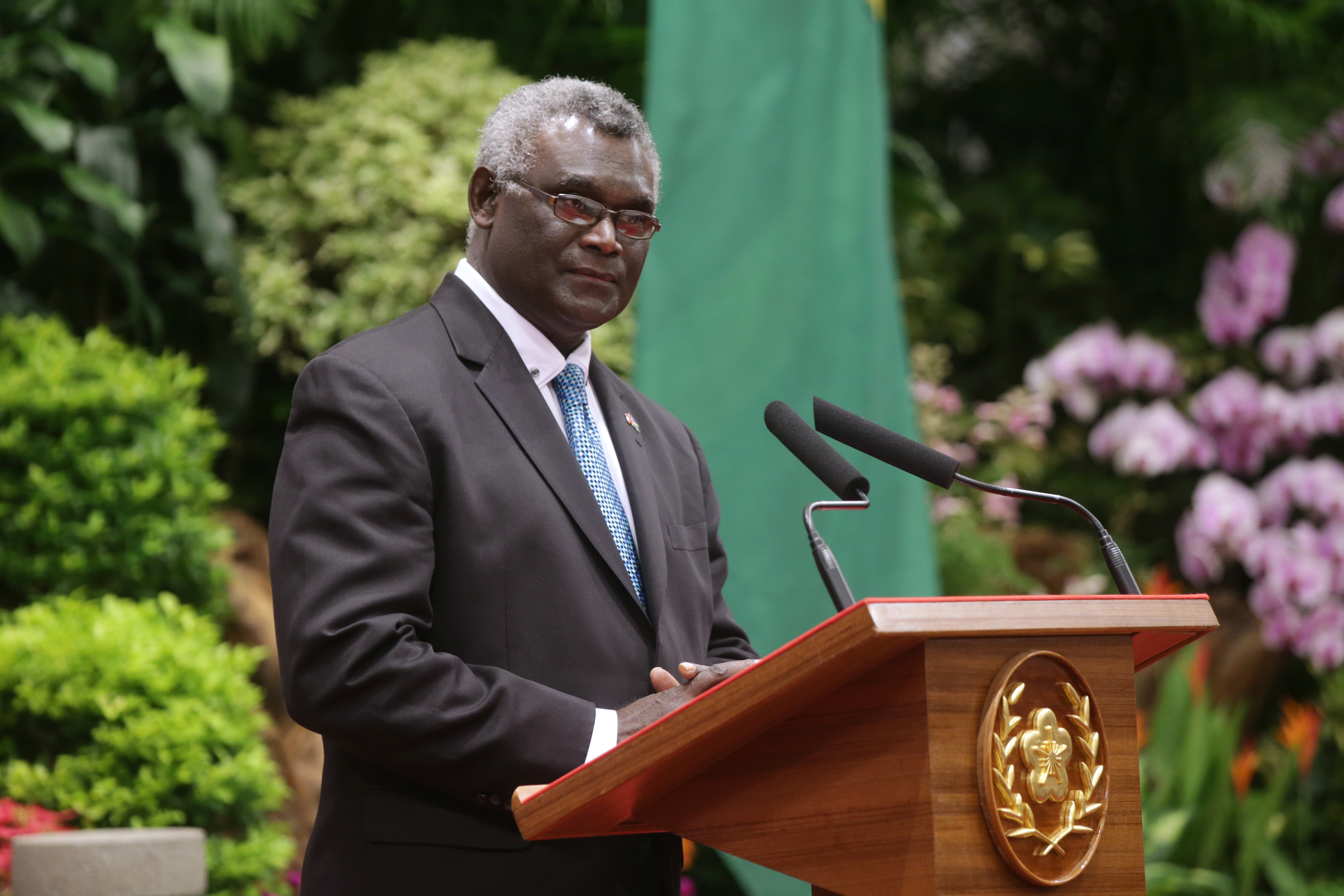 索羅門群島蘇嘉瓦瑞總理於國宴致詞時表示，面對艱困時刻，非常感謝臺灣對索國提供的各項支援與情誼。未來，唯有透過臺索雙邊交流與合作，才能達成共同目標